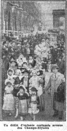 Défilé d'enfants costumés sur l'avenue des Champs Elysées le jour de la Mi-Carême 1935.